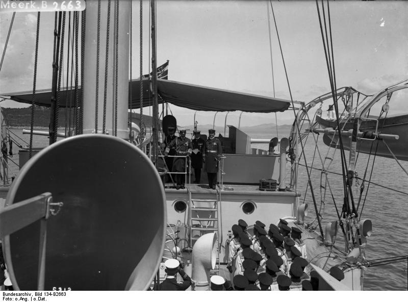 Kaiser Wilhelm II. auf der SMS "Geier" SMS "Geier", Kaiser Wilhelm II. spricht zur Besatzung [Kleiner geschützter Kreuzer "Geier", Stapellauf 18.101894 auf der Kaiserlichen Werft in Wilhelmshaven, bestimmt zum Einsatz in den Überseegebieten, 1914 auf Hawaii interniert, nach Kriegseintritt der USA konfisziert, in USS "Schurz" umbenannt, 1918 nach K] Abgebildete Personen: Wilhelm II.: Deutsches Reich, Kaiser, II., Deutschland